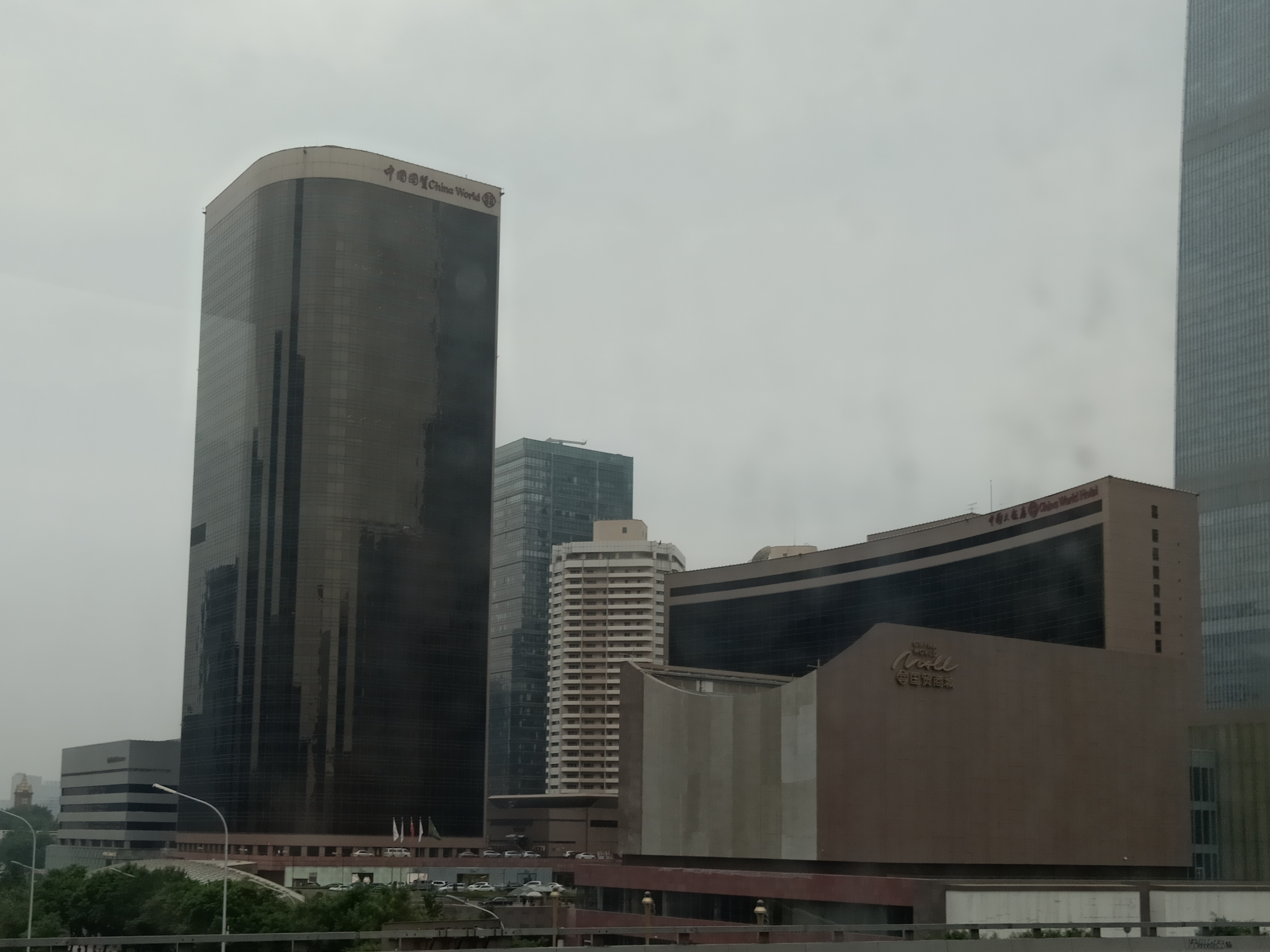 粵語: 中國大飯店